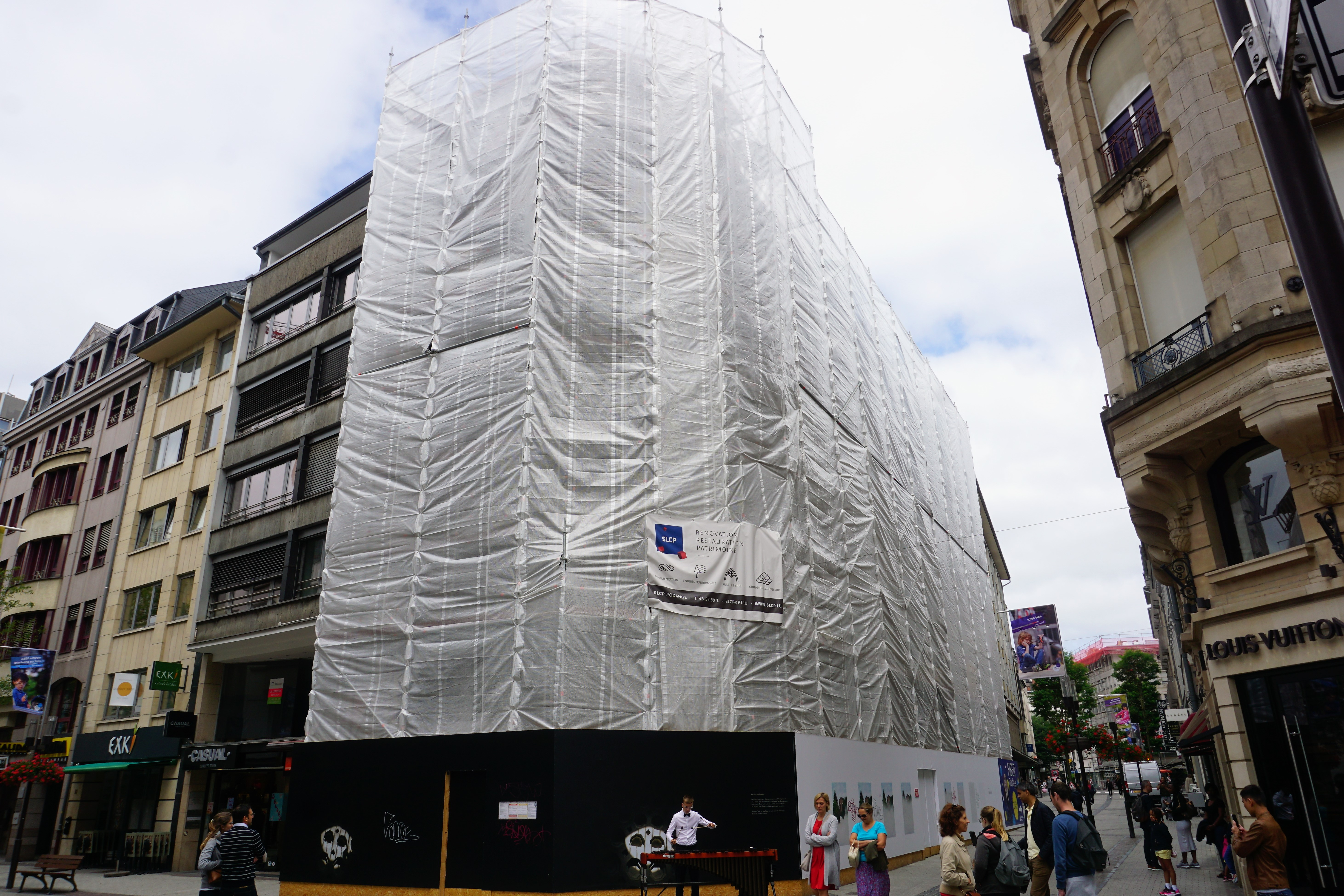 Grand-Rue à Luxembourg-Ville, ancien immeuble Meta Brahms en réonvation.